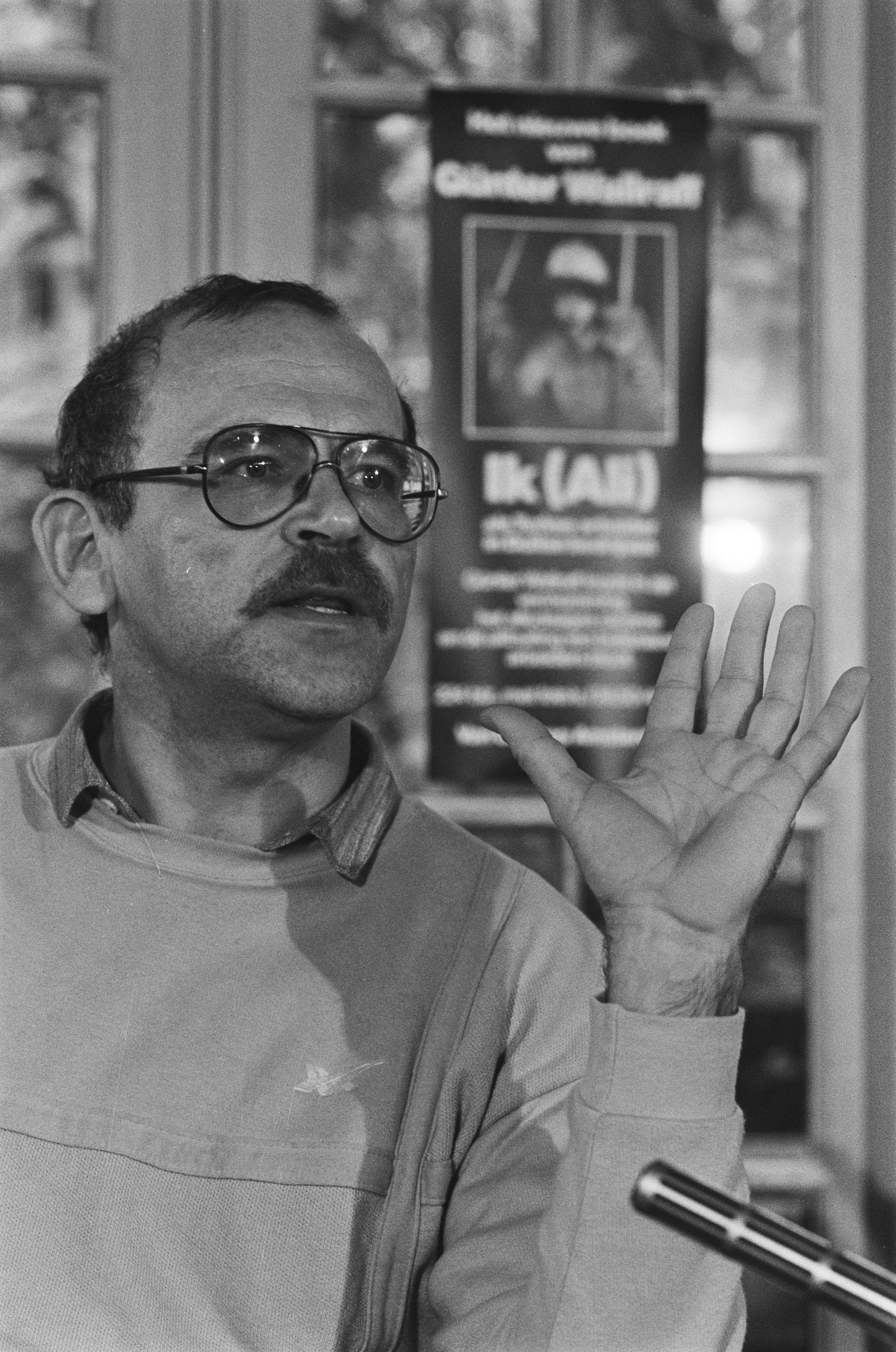 Collectie / Archief : Fotocollectie Anefo Reportage / Serie : [ onbekend ] Beschrijving : Duitse schrijver Günter Wallraff in Amsterdam ivm vertaling "Ganz Unten"; Günter Wallraff tijdens persconferentie Datum : 8 november 1985 Locatie : Amsterdam, Noord-Holland Trefwoorden : boeken, persconferenties, schrijvers Persoonsnaam : Wallraff, Günter Fotograaf : Croes, Rob C. / Anefo Auteursrechthebbende : Nationaal Archief Materiaalsoort : Negatief (zwart/wit) Nummer archiefinventaris : bekijk toegang 2.24.01.05 Bestanddeelnummer : 933-4799